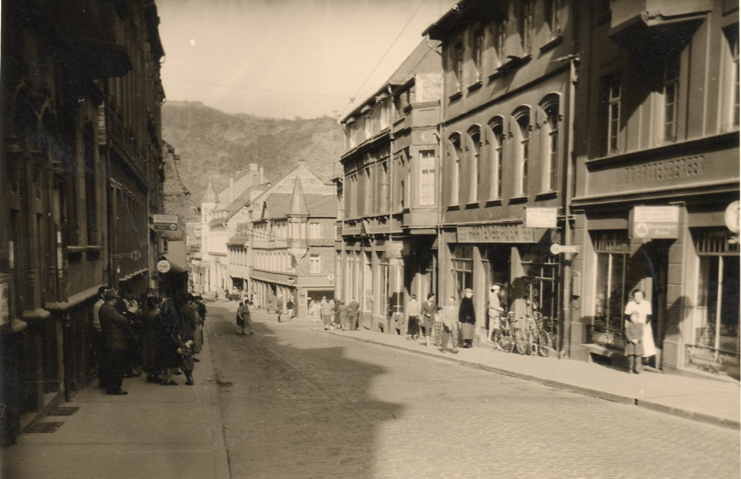 Idar-Oberstein, Altstadt, 1957